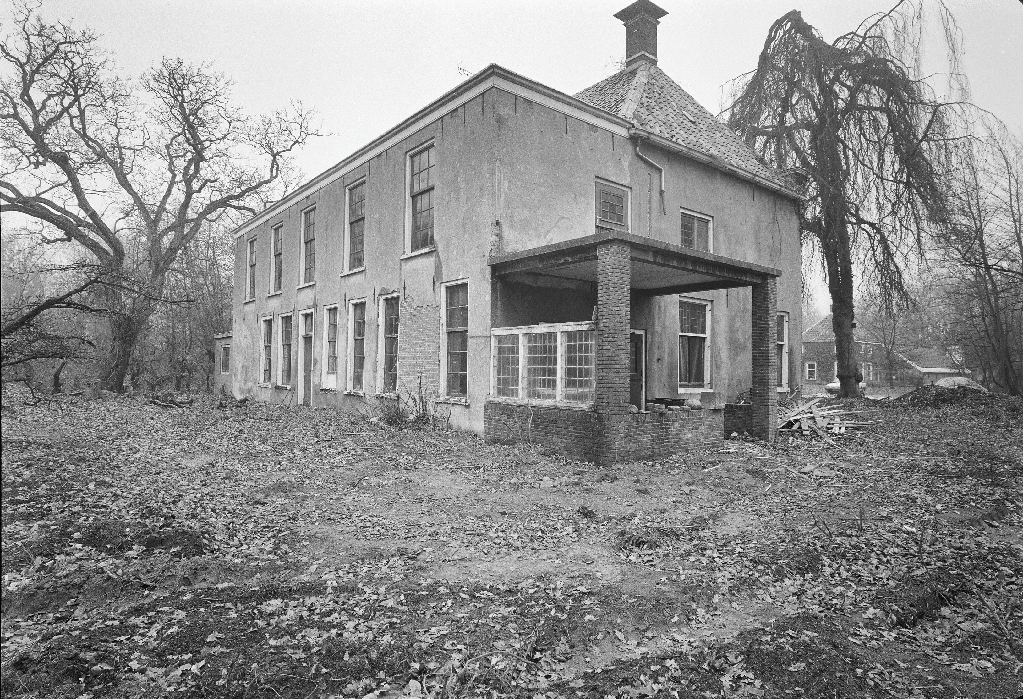 Huis te Glimmen: Overzicht linker zijgevel, achtergevel